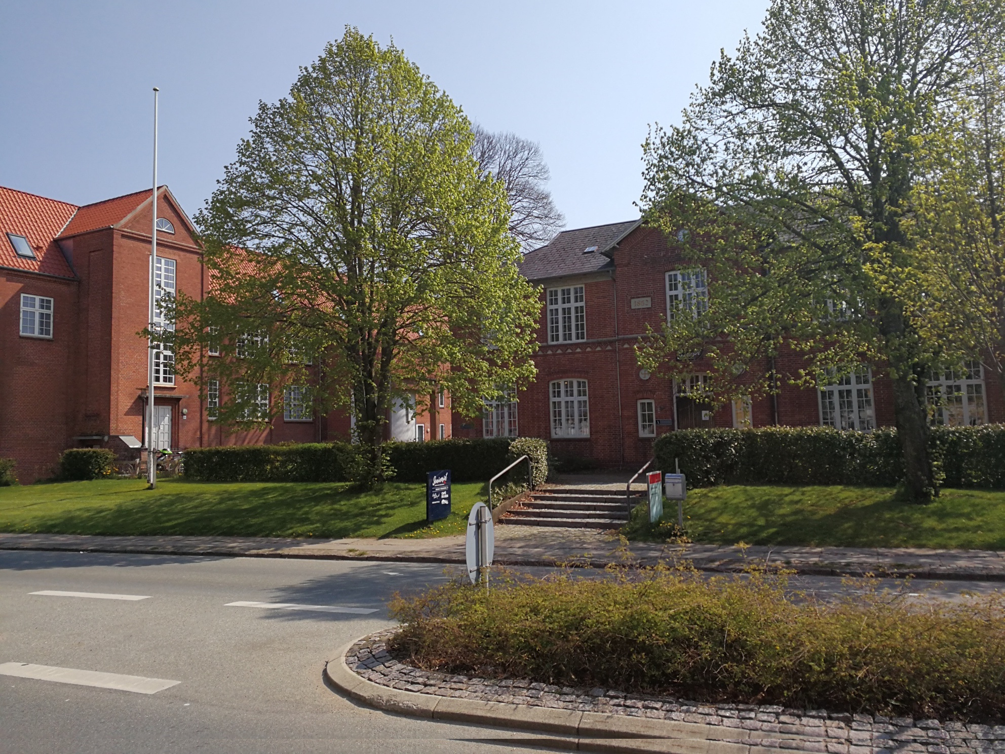 Hovedbygningen - Gedved seminarium